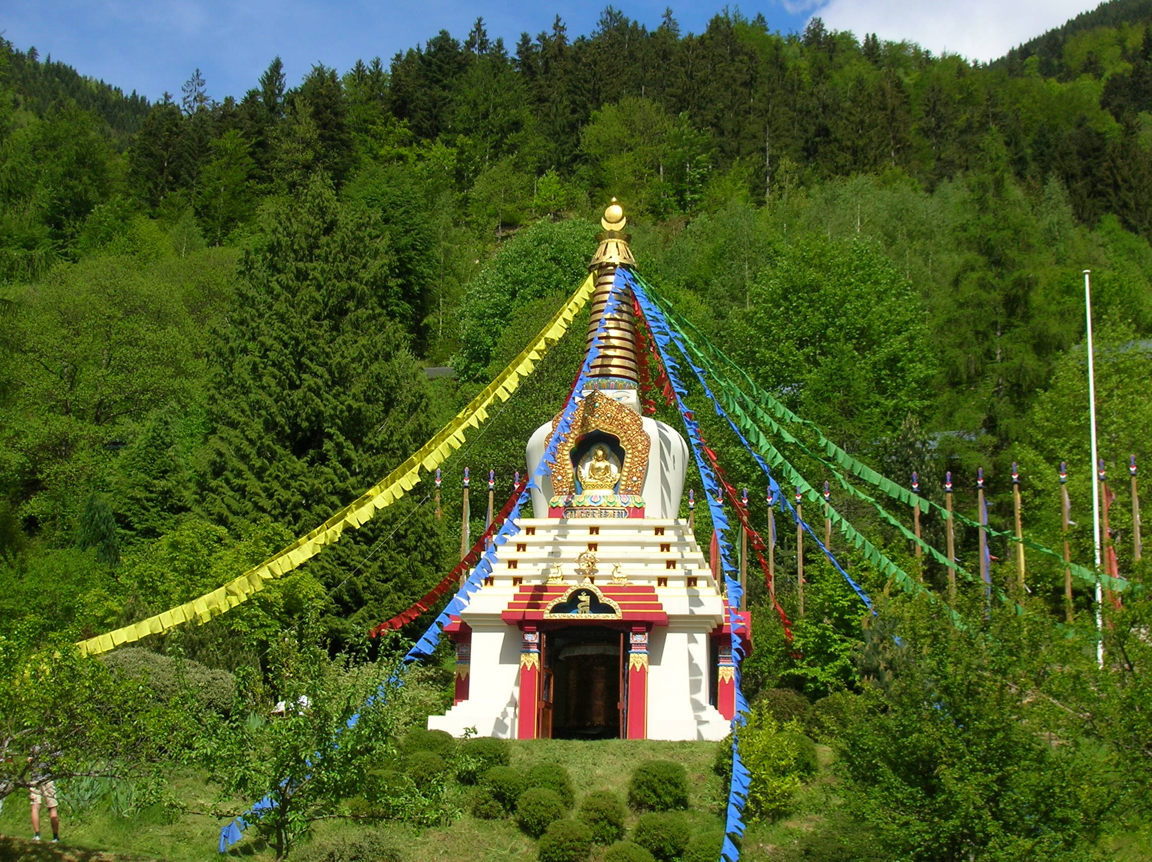 Grand stūpa. Première journée de "HARMONIE DES STEPPES", Festival culturel mongol de l'Institut Karma Ling. Chartreuse de Saint Hugon, Hameau de Saint Hugon, Arvillard, Isère, AuRA, France.